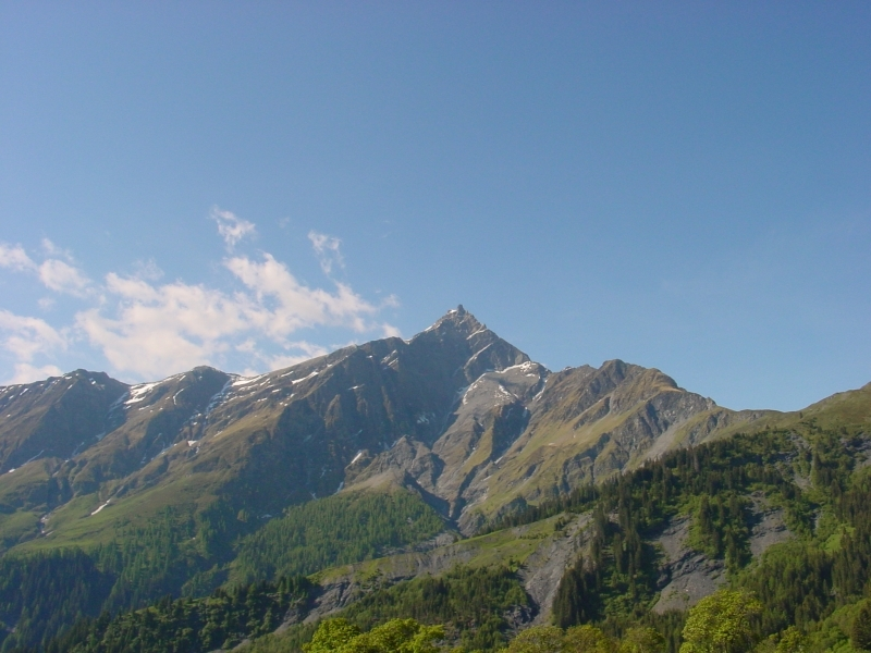 Der Piz Beverin vom Heinzenberg aus fotografiert (Nordwand).